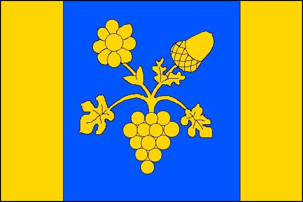 Vlajka obce Lichnov (okres Bruntál)